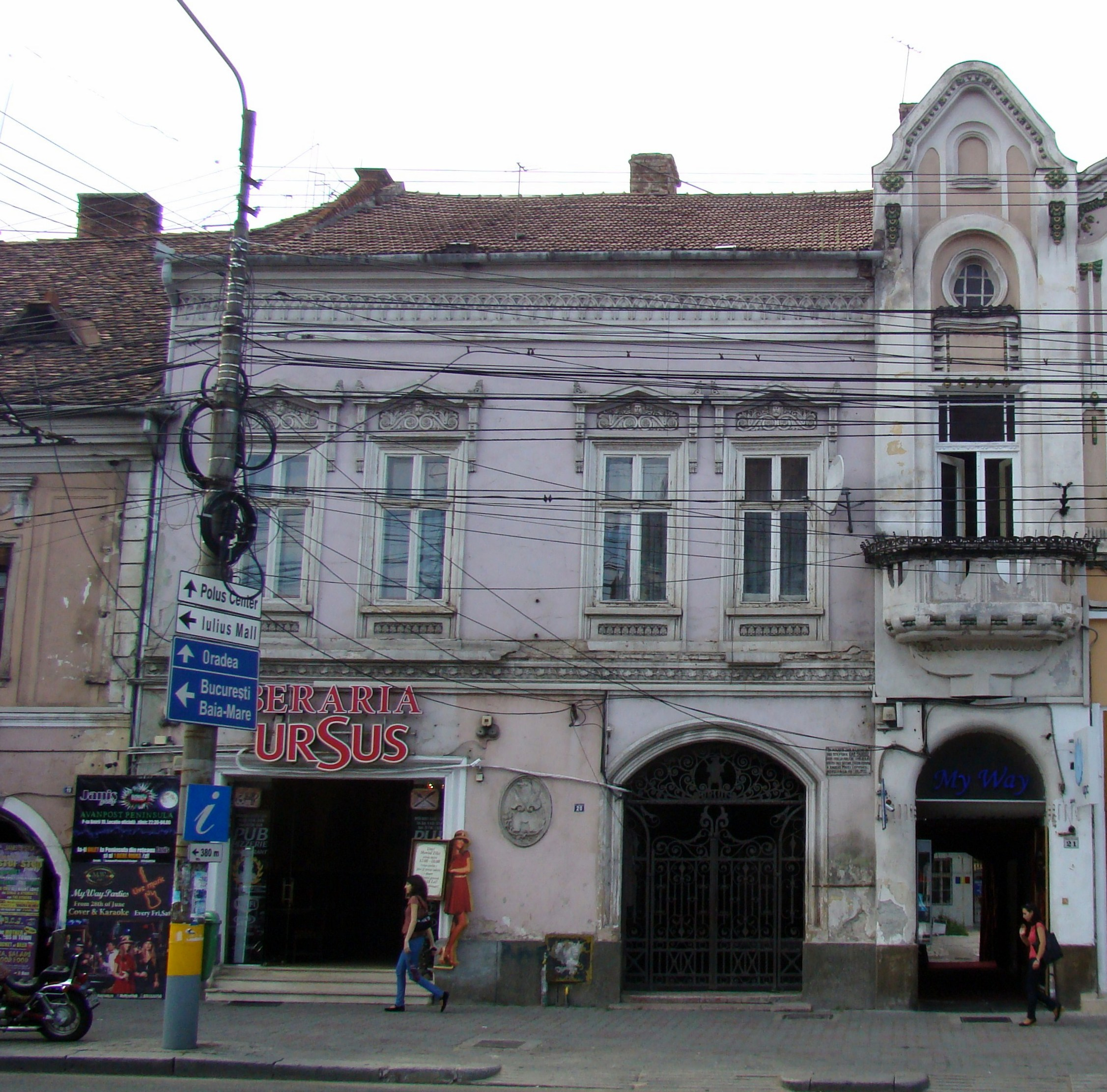 Casă monument istoric, Piața Unirii 20